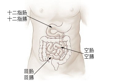 来源：